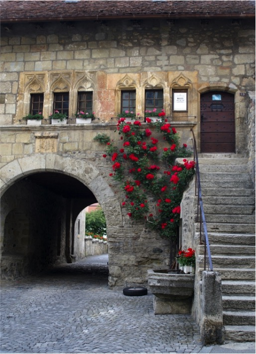 Vue de la façade du musée d'Estavayer-le-lac, avec des géraniums aux fenêtres et un rosier sur le côté